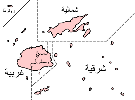 == Fiji divisions named in Arabic أقسام فيجي باللغة العربية